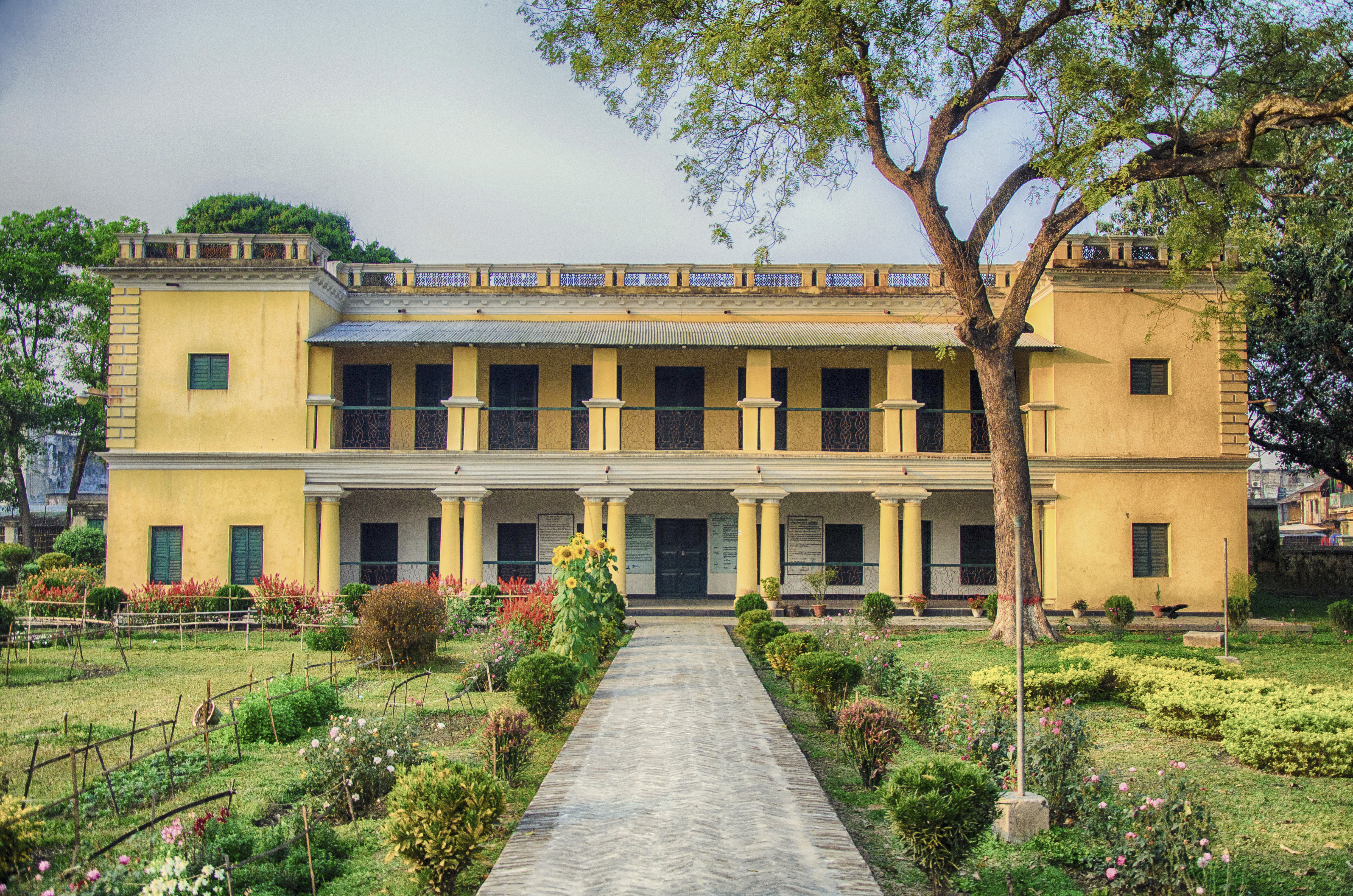 রবীন্দ্র কাচারী বাড়ি